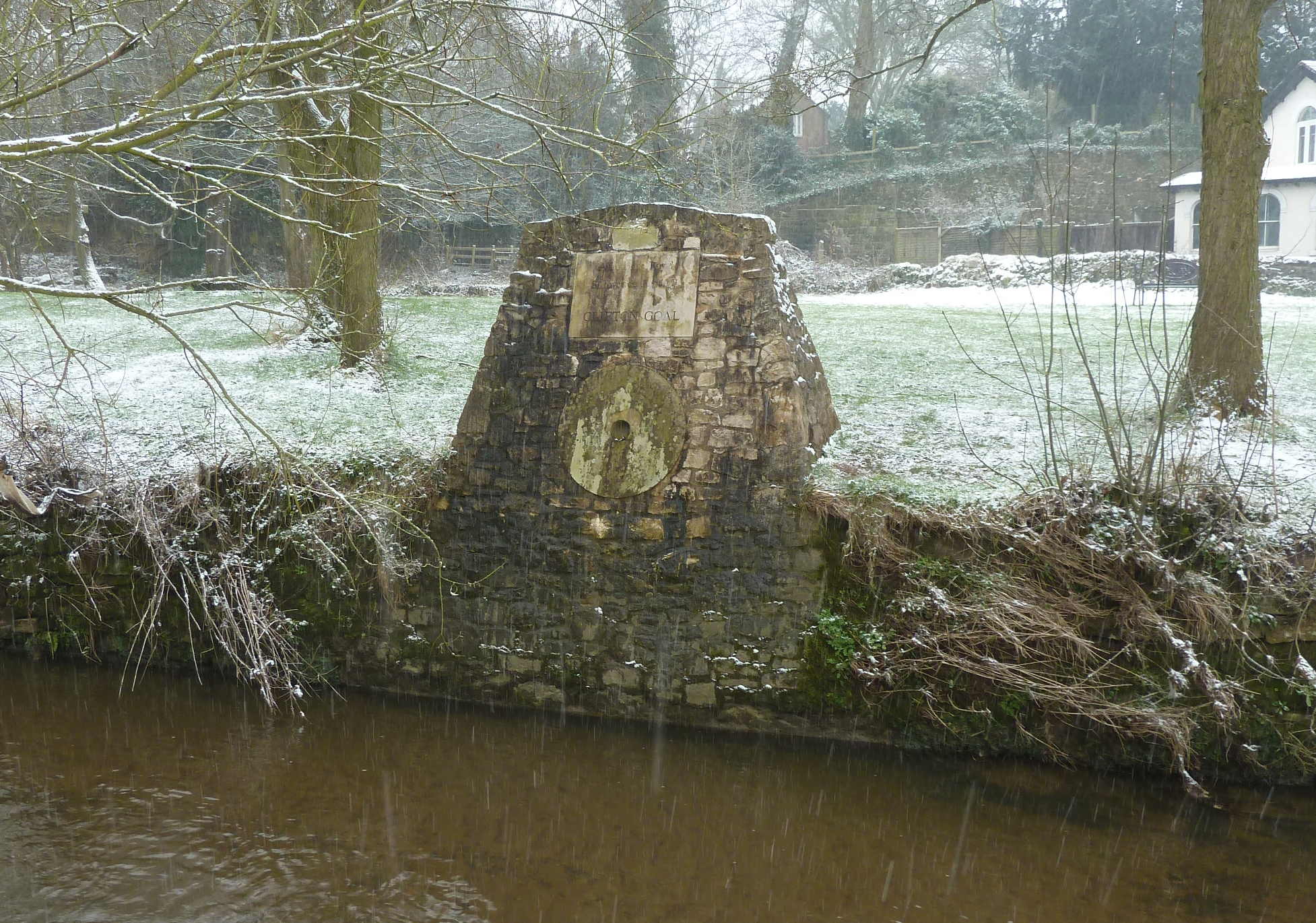 Tor der Downwards beim Shrovetidefußball